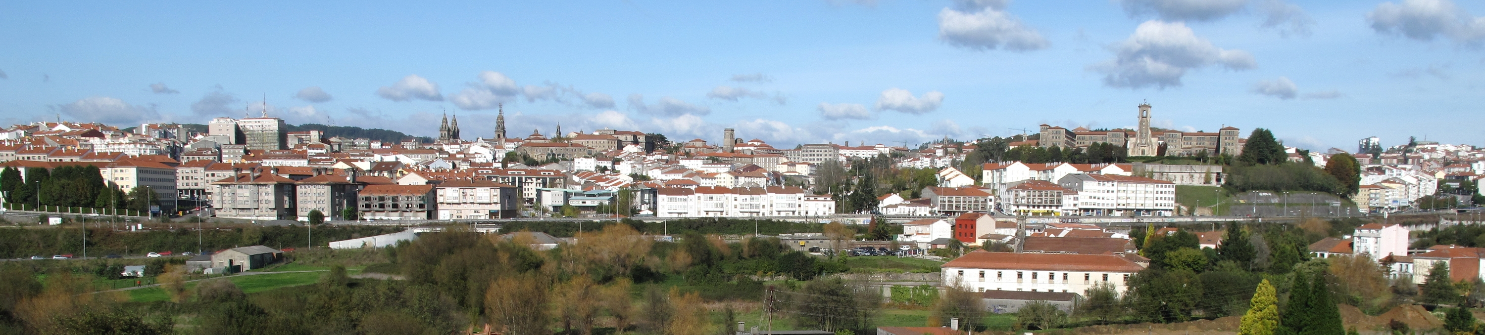 Santiago de Compostela, visto dende a rúa Santas Mariñas